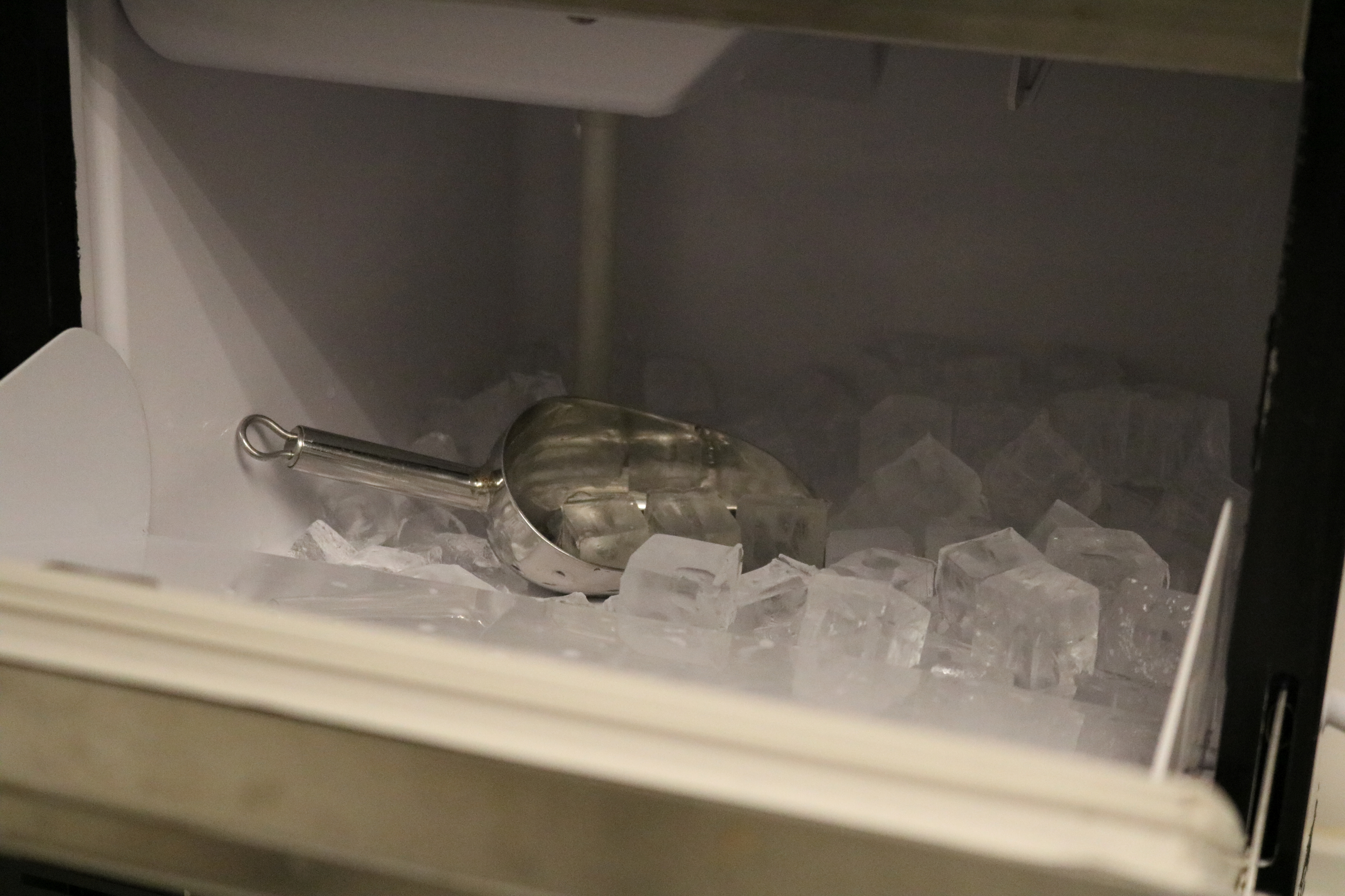 Geöffnete Eissschublade in einer Hoshizaki Eismaschine.